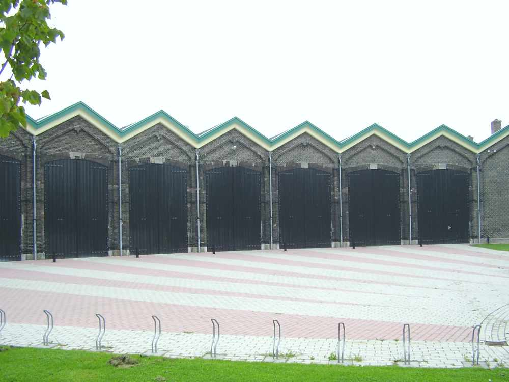 Oude Remise in Nieuweschans. Eigen foto van Marco Roepers genomen op 20-8-2005.